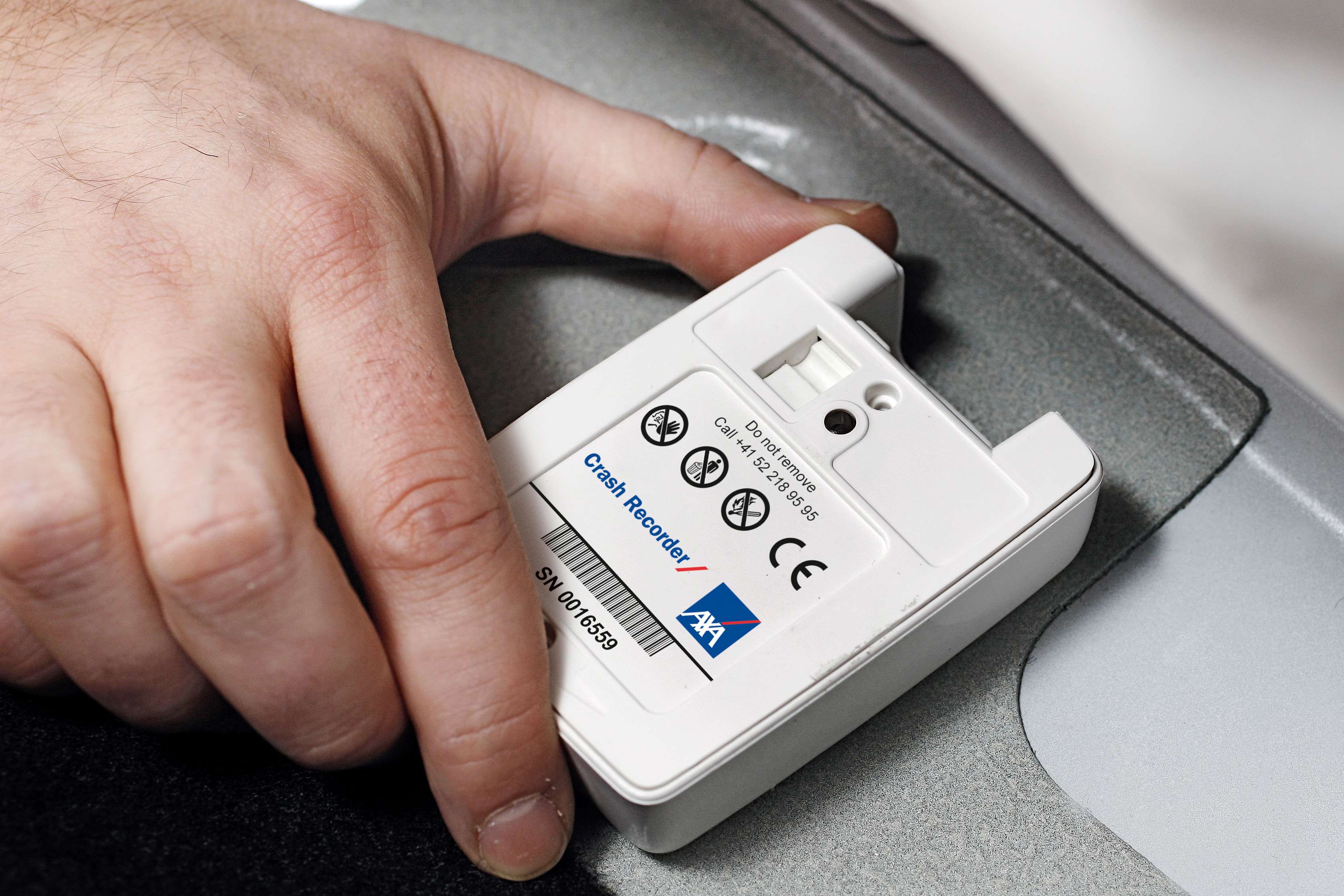 Größenvergleich eines Crash Recorders (Cara 200)